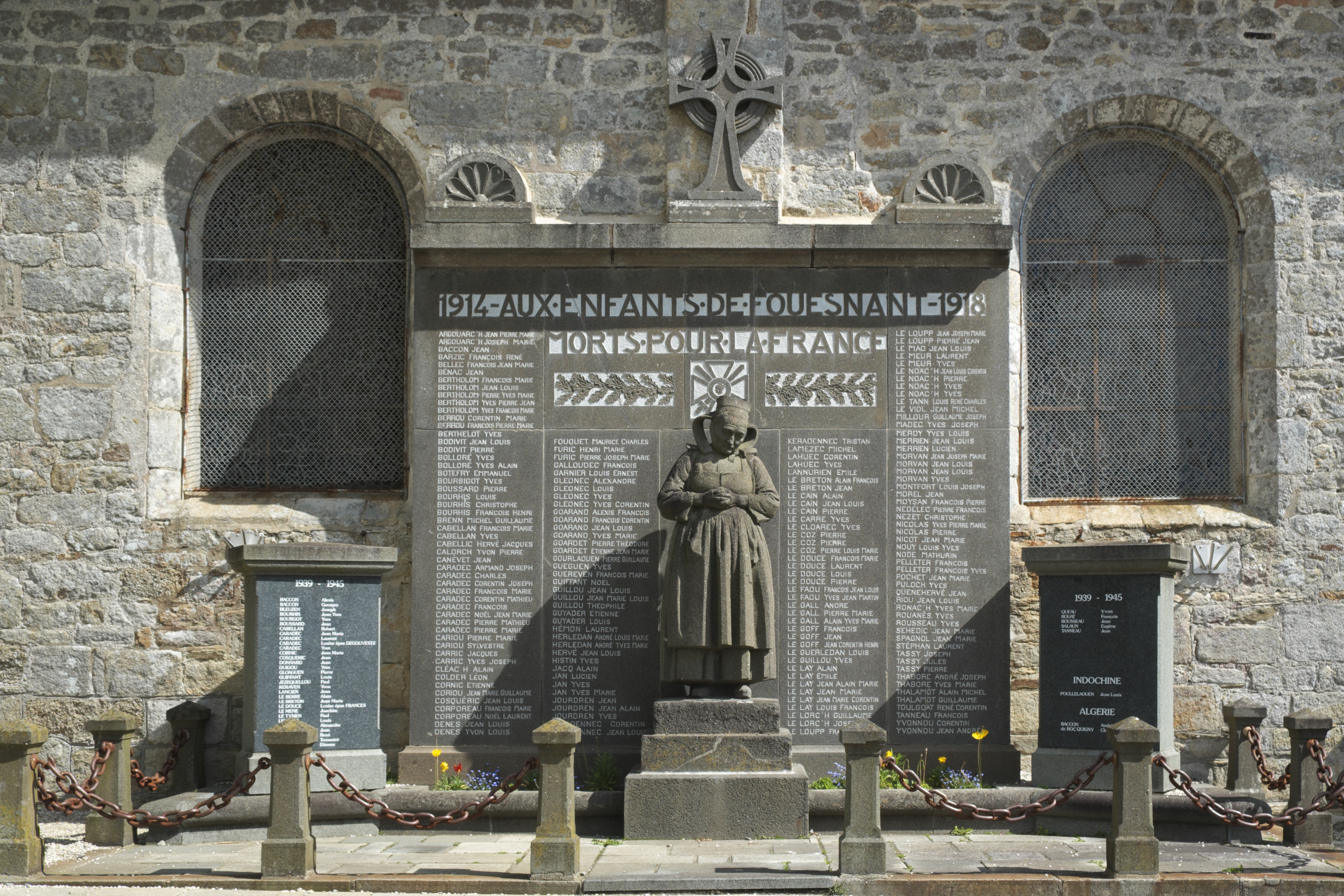 Katholische Pfarrkirche Saint-Pierre-et-Saint-Paul in Fouesnant im Département Finistère (Region Bretagne/Frankreich), Kriegerdenkmal an der Südseite der Kirche